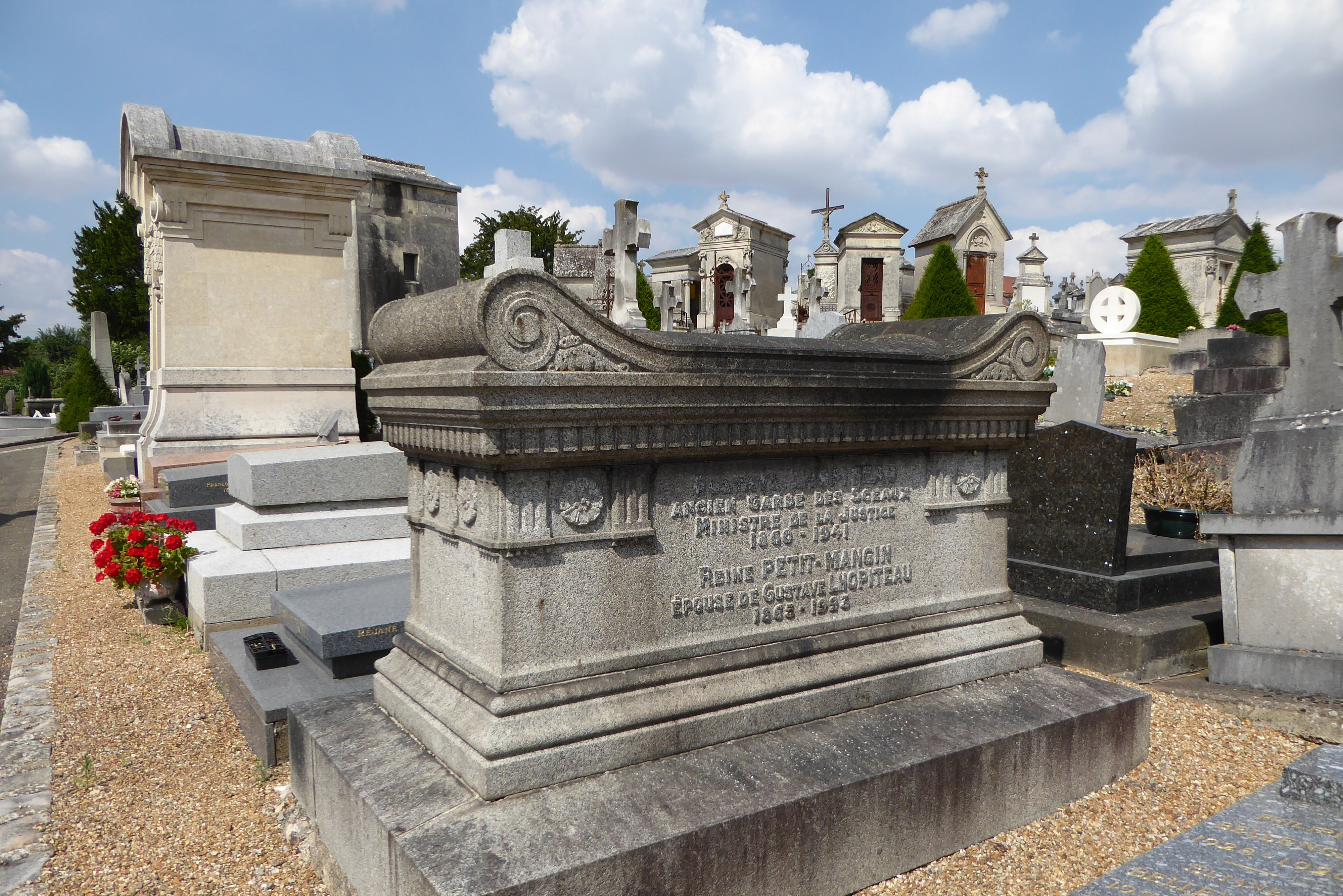 Sépulture de Gustave Lhopiteau et de son épouse, cimetière Saint-Cheron, Chartres, Eure-et-Loir (France).